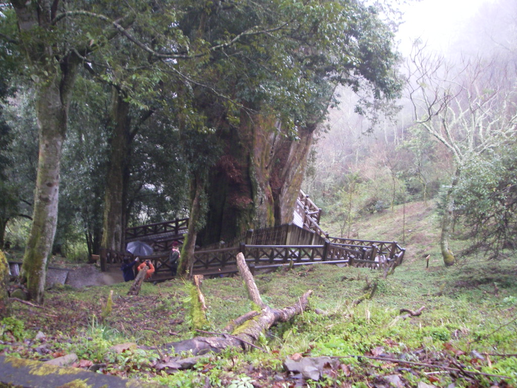 鹿林神木全景（較清楚）